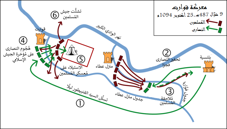 خريطة تُصوِّرُ معركة قوارت بين المُسلمين تحت راية الدولة المُرابطيَّة، والنصارى تحت راية مملكة قشتالة.